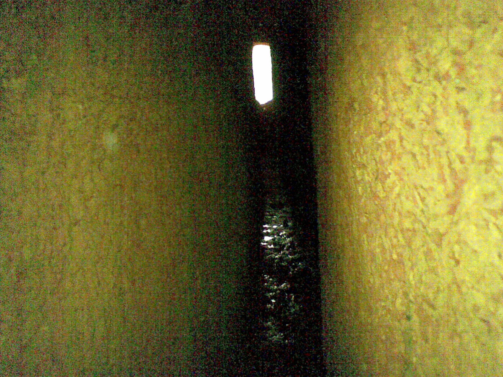 സുരംഗം അകത്തുനിന്നുള്ള കാഴ്ച, ബേഡഡുക്ക കാസർഗോഡ് നിന്നും